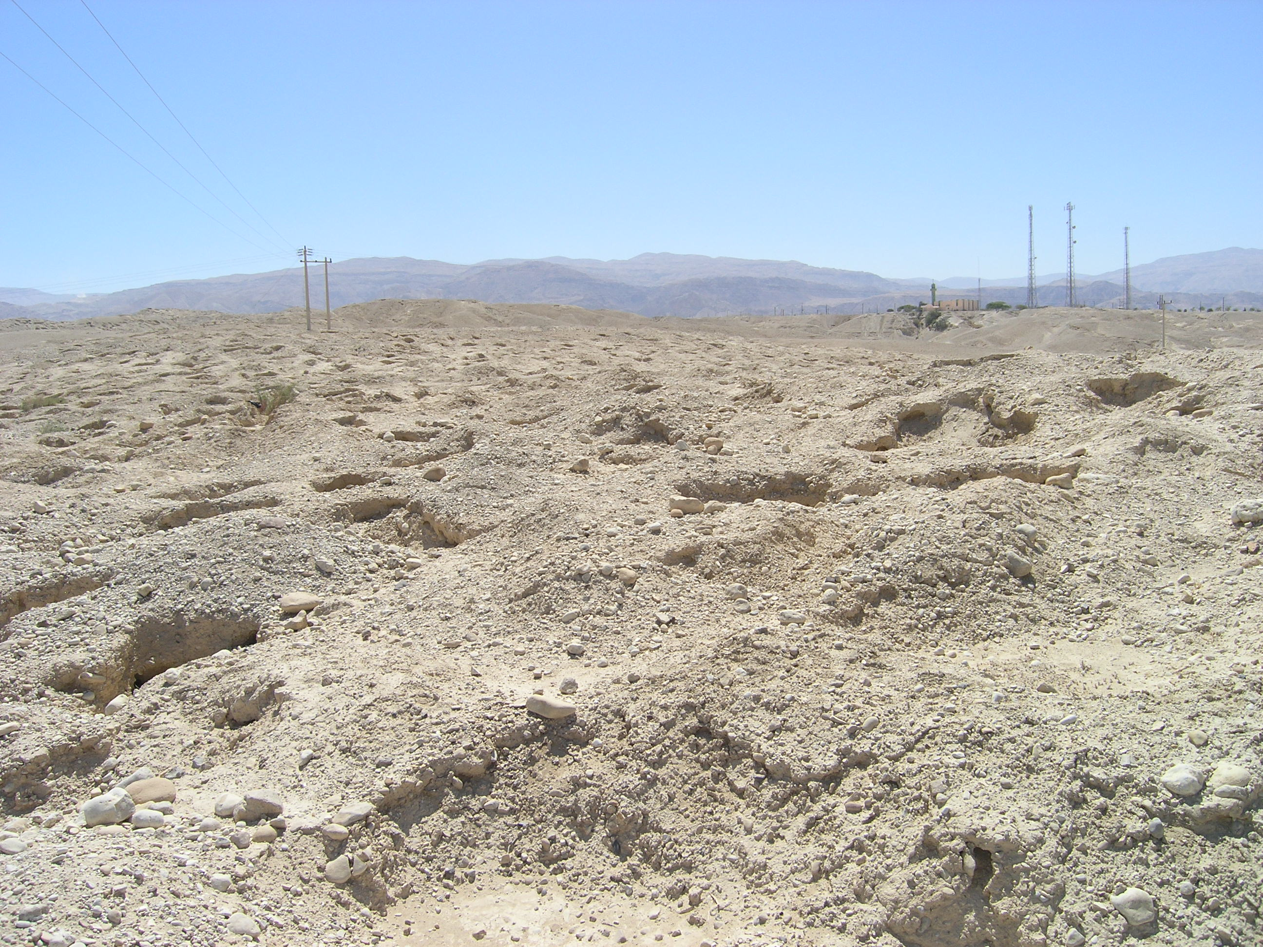 Bab edh-Dhra, bronzezeitliches Gräberfeld in der Ebene (Cemetery C)